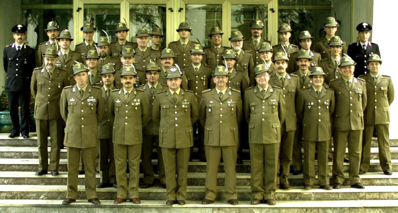 Ufficiali e sottoufficali in posa, Bressanone, Alto Adige, Italia. Uploaded first to Italian Wikipedia: Author /: Luca Lorenzi (user:Llorenzi)